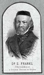 הרב זכריה פרנקל מתוך אתר המוזיאון היהודי-אמסטרדם- תמונות לשימוש חופשי רישיון לפי he:שיחת משתמש:Ohle בקשר לhe::תמונה:Geiger.jpg.